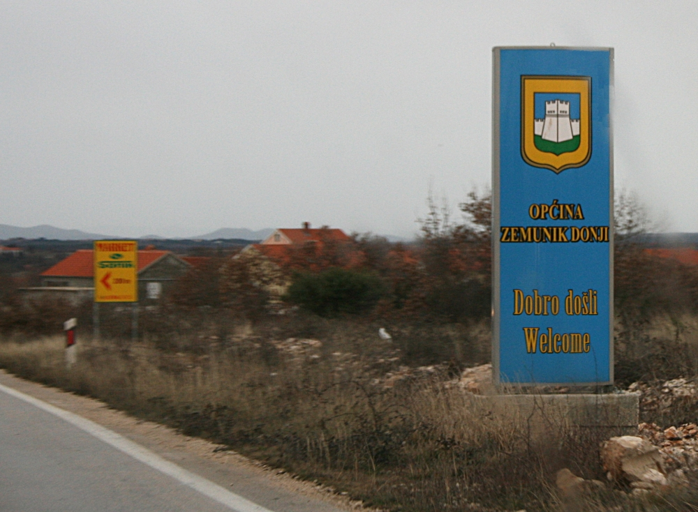 Zagreb_Split